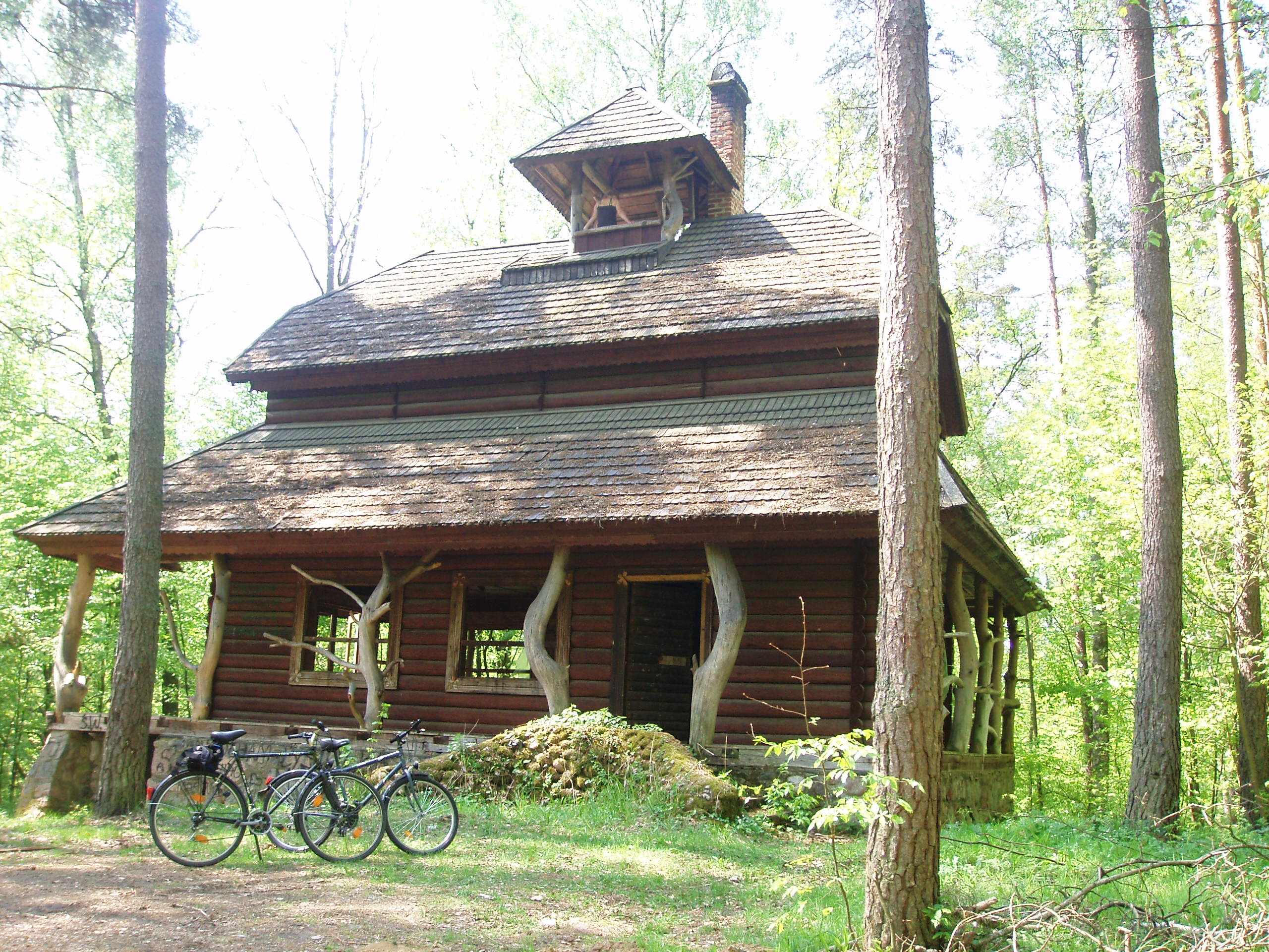 Domek myśliwski Gierka w Lesie Warmińskim